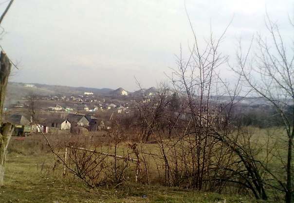 краєвид смт Білогоріви з в.Кірова